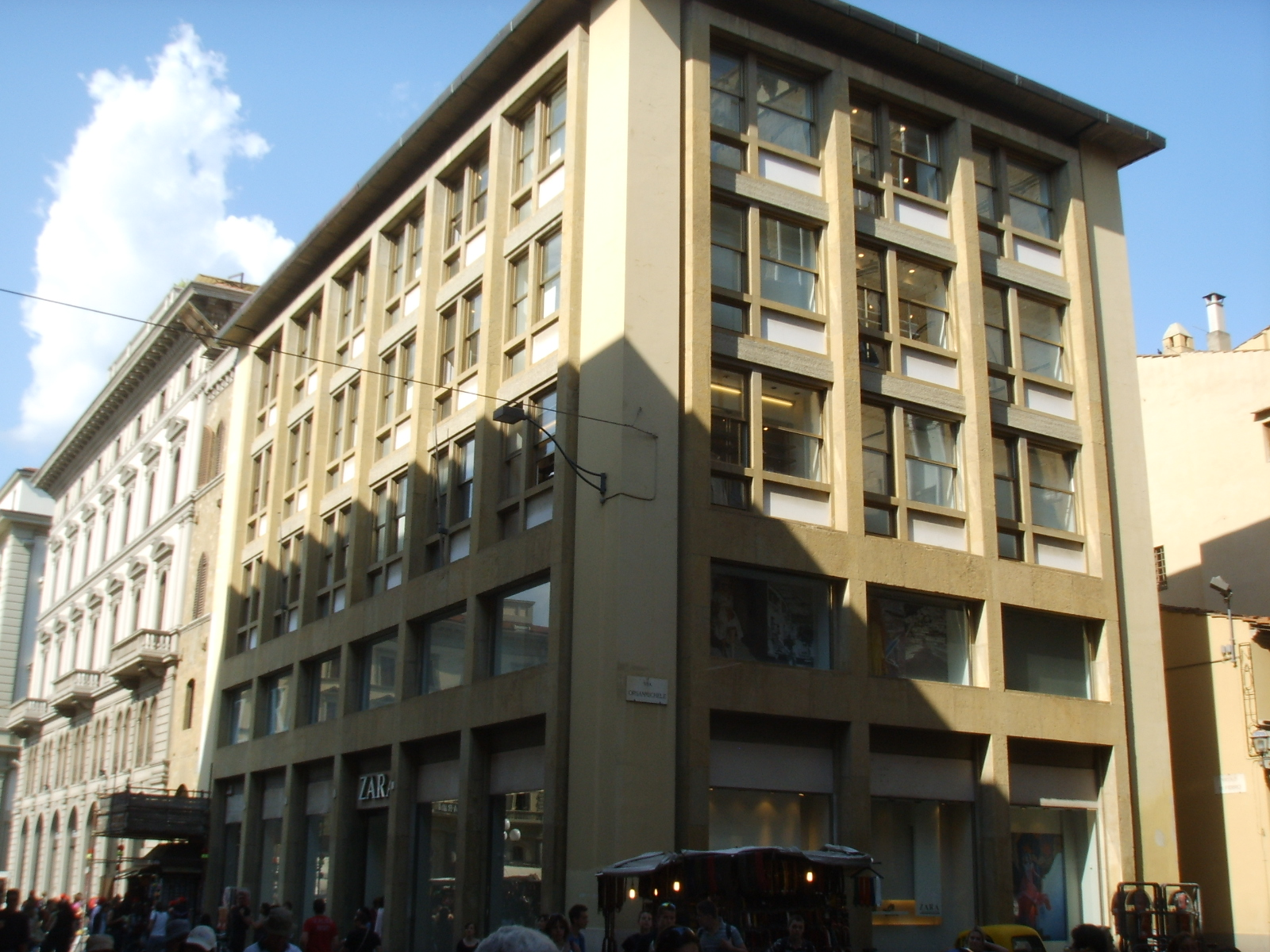 Ex-banco di sicilia